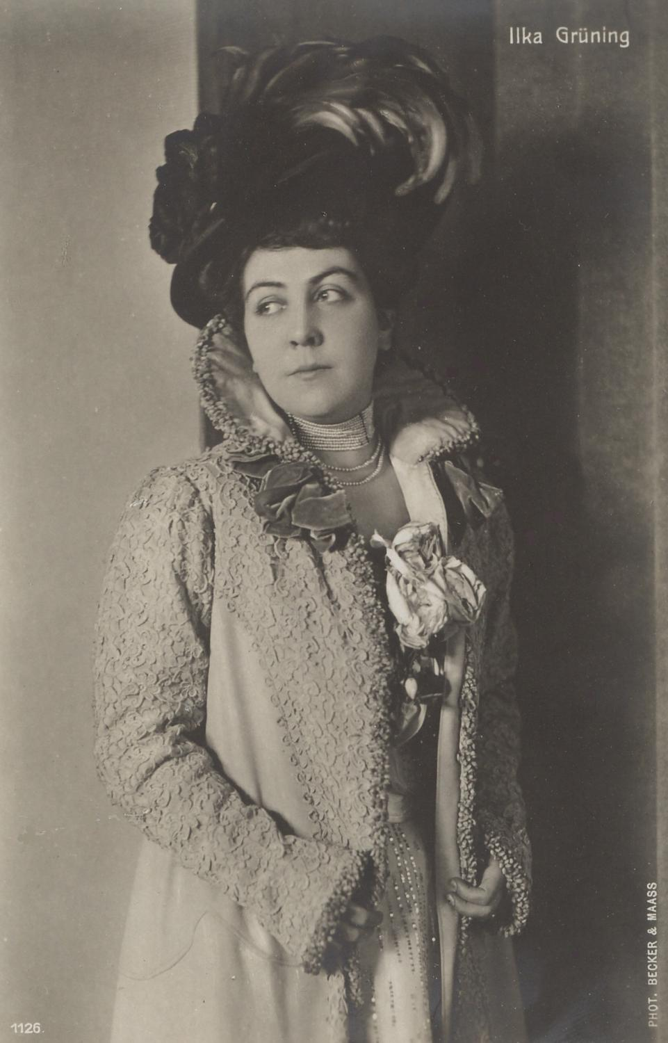 Die Schauspielerin Ilka Grüning um 1900. Photopostkarte des Ateliers (Otto) Becker & (Heinrich) Maass